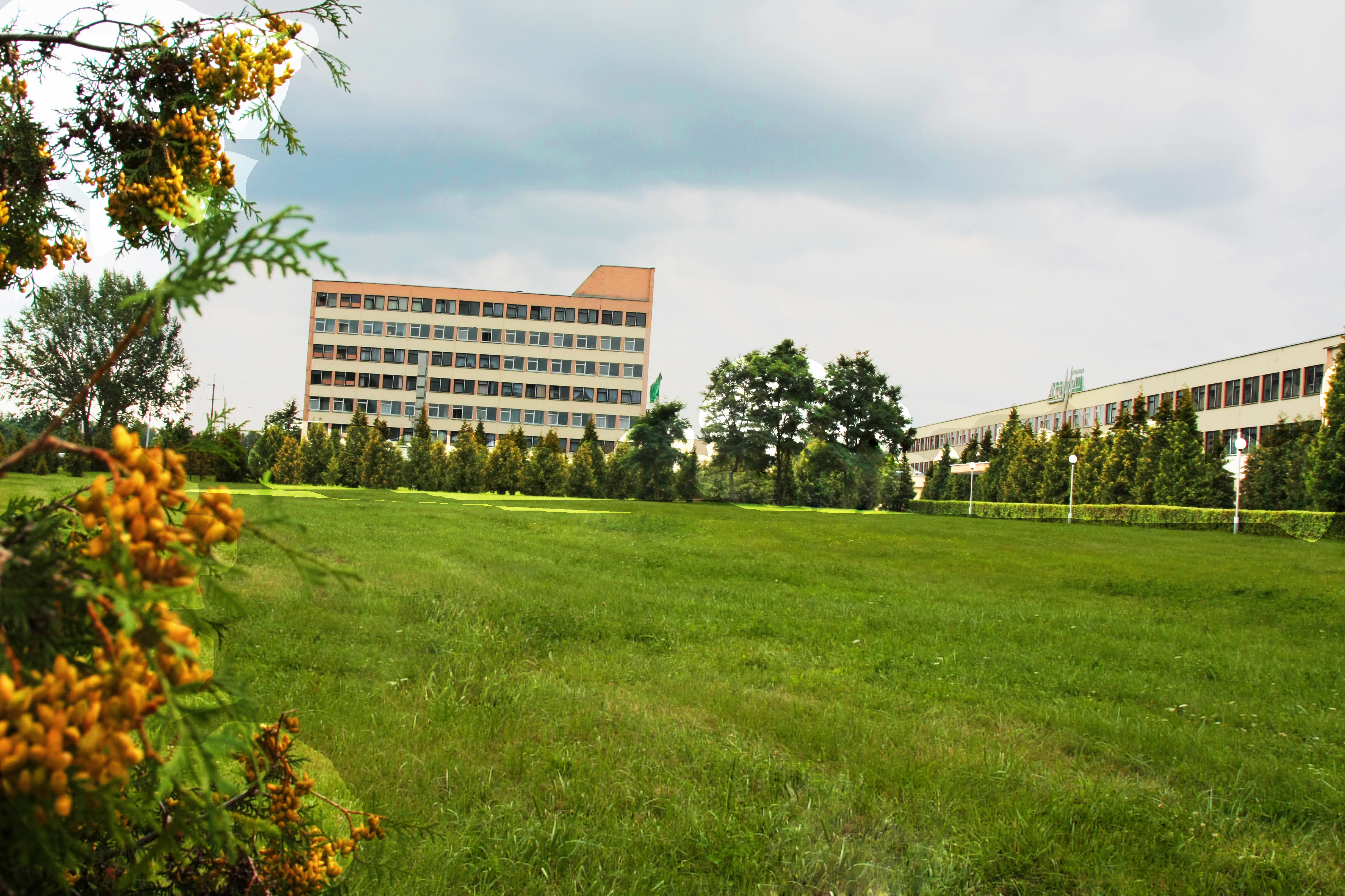 Корпус заводоуправления ОАО "УКХ "Бобруйскагромаш"